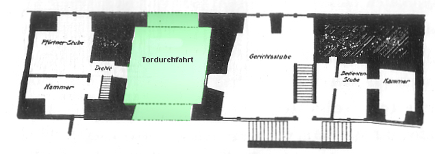 Burg Gebhardshagen, Torhaus, in: Die Kunstdenkmale des Kreises Wolfenbüttel von Paul Jonaus Meier.